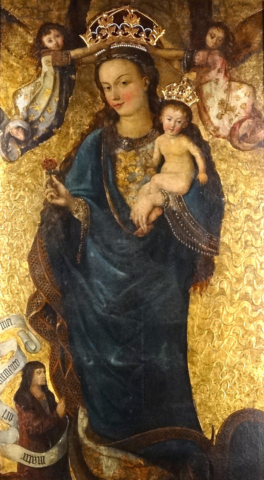 Obraz Matki Bożej Pięknej Miłości w ołtarzu głównym katedry bydgoskiej; "Madonna Bydgoska" (XV w.), dwukrotnie koronowany (1966, 1999)